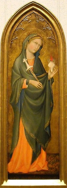 Benedetto_di_Bindo._St._Lucy._ca._1410._Institute_of_Art,_Minneapolis